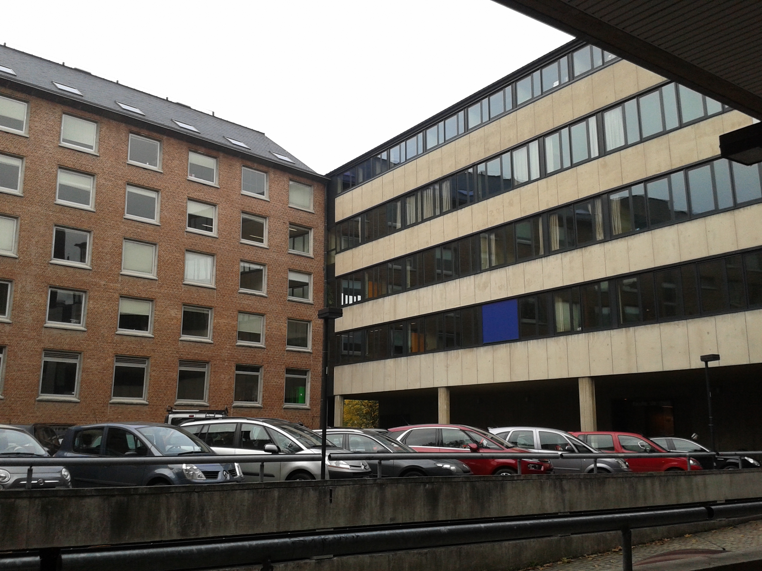 faculté droit unamur